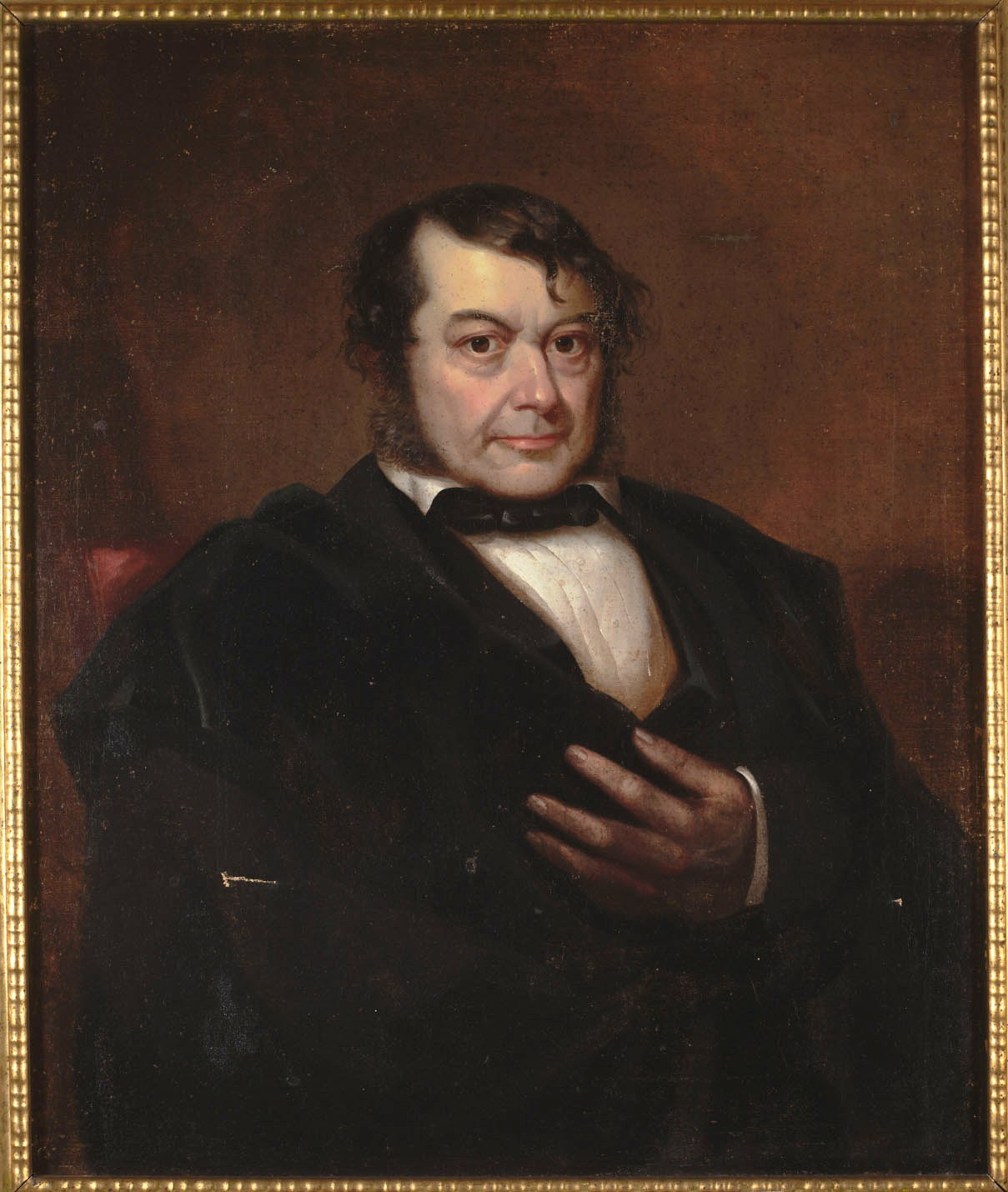 José Joaquín Estudillo (1800–52), founder of San Leandro, California